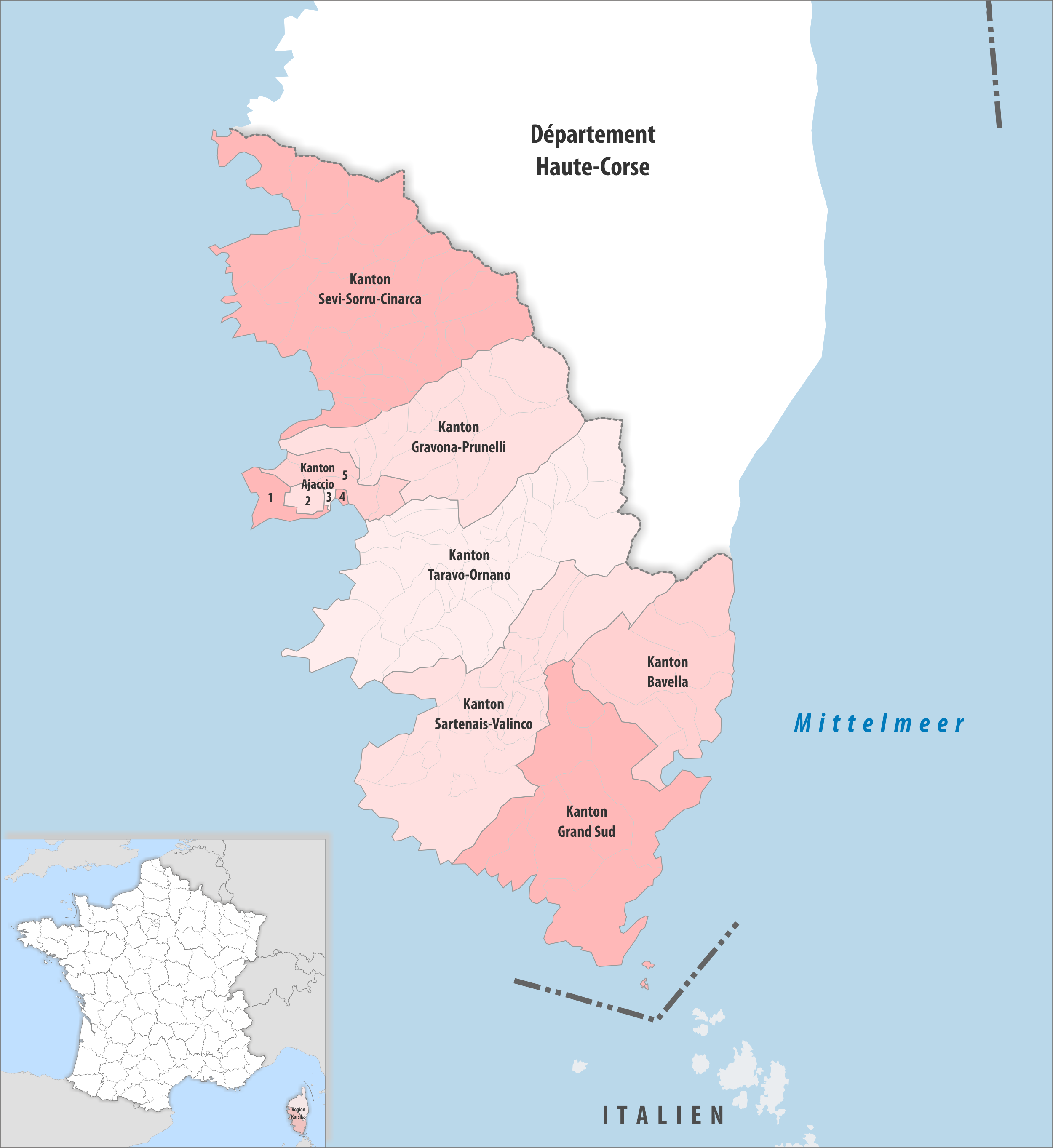 Gemeinden und Kantone im Departement Corse-du-Sud